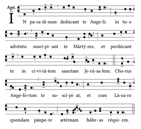 Antiphon zur Begräbnisfeier In paradisum deducant te angeli - Zum Paradies mögen Engel dich geleiten